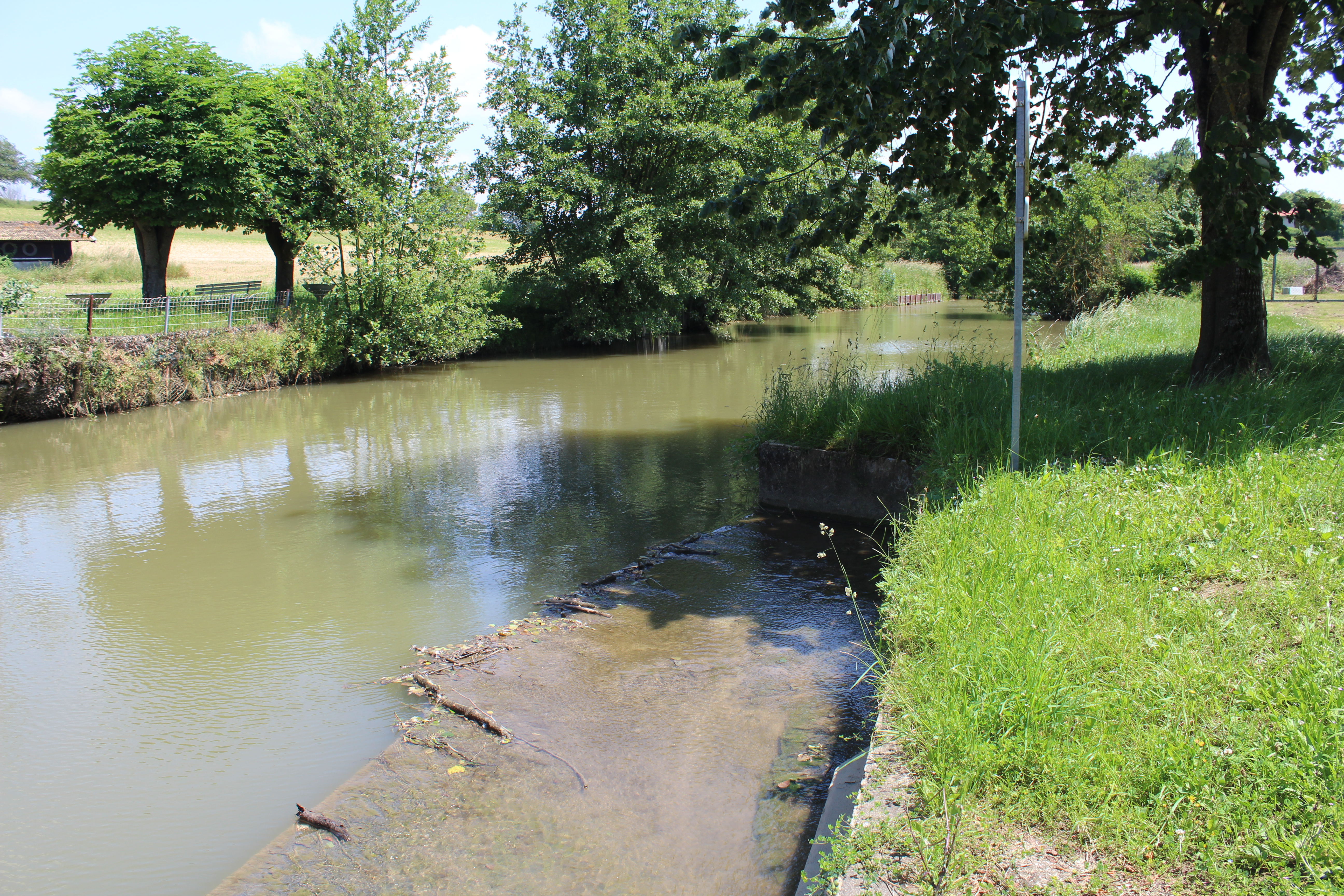 Le Grand Loëze à la frontière entre Bâgé-le-Châtel et Bâgé-la-Ville.